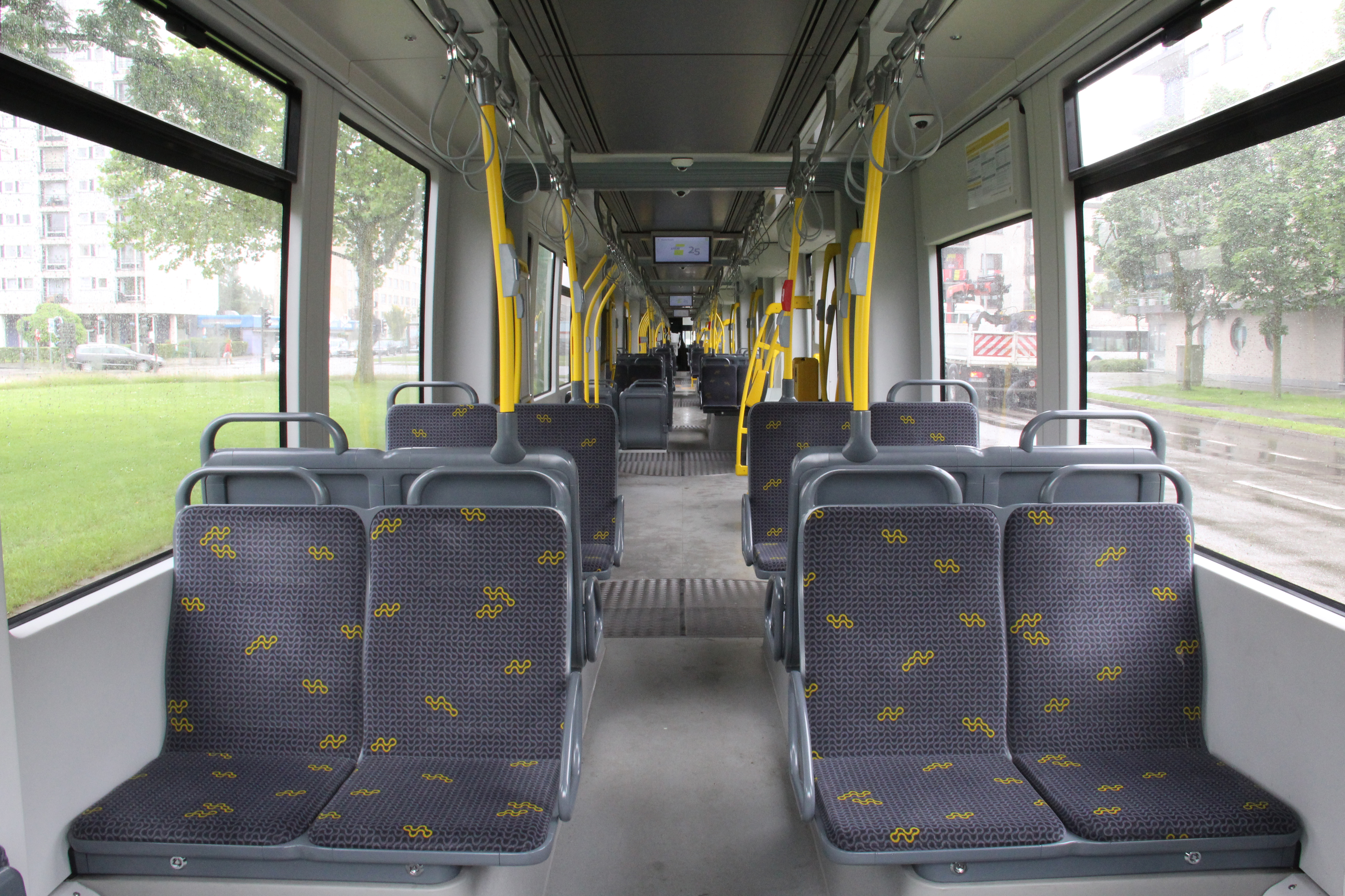 Interieur van een 7-delige Albatros tram in Antwerpen.